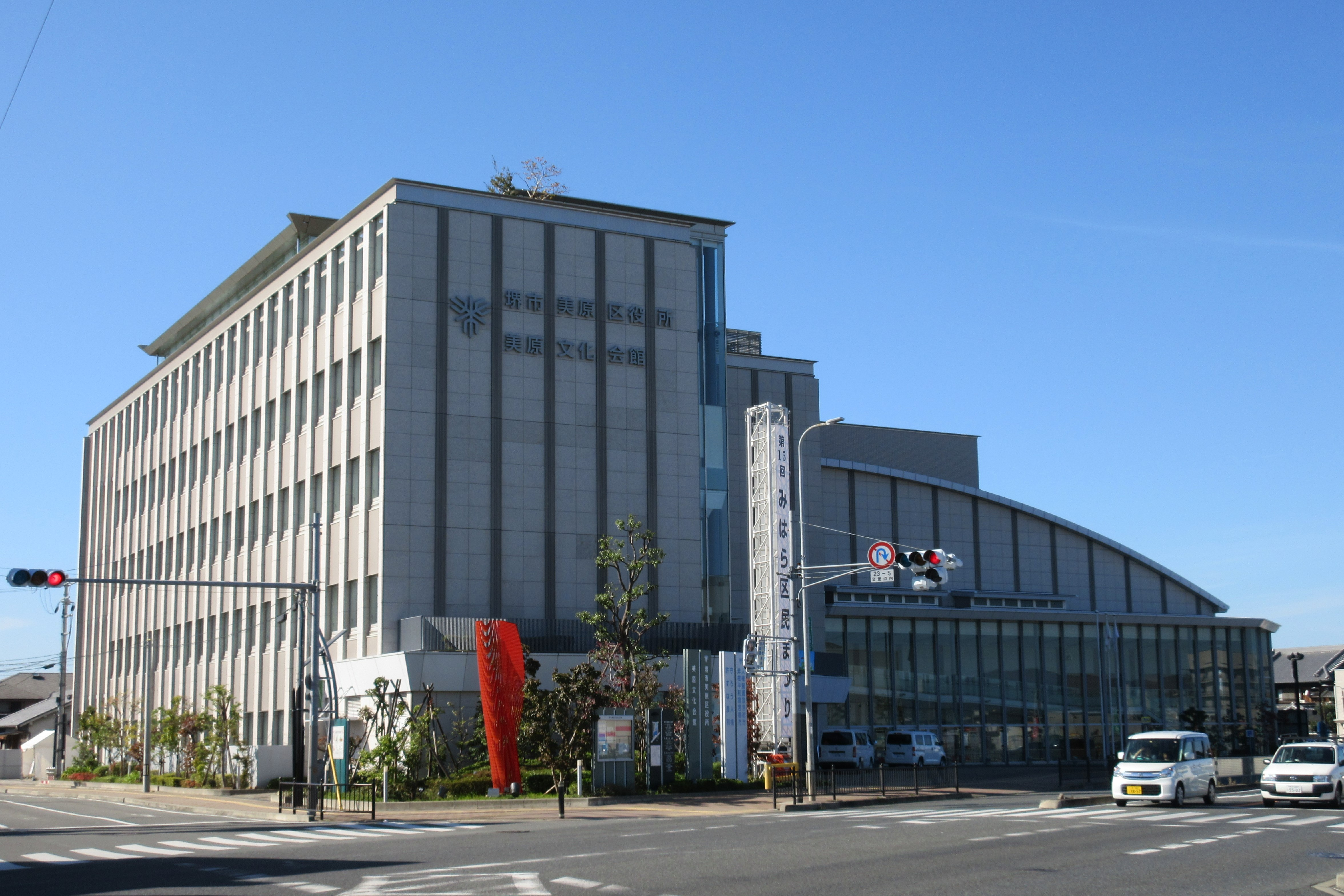 堺市美原区役所